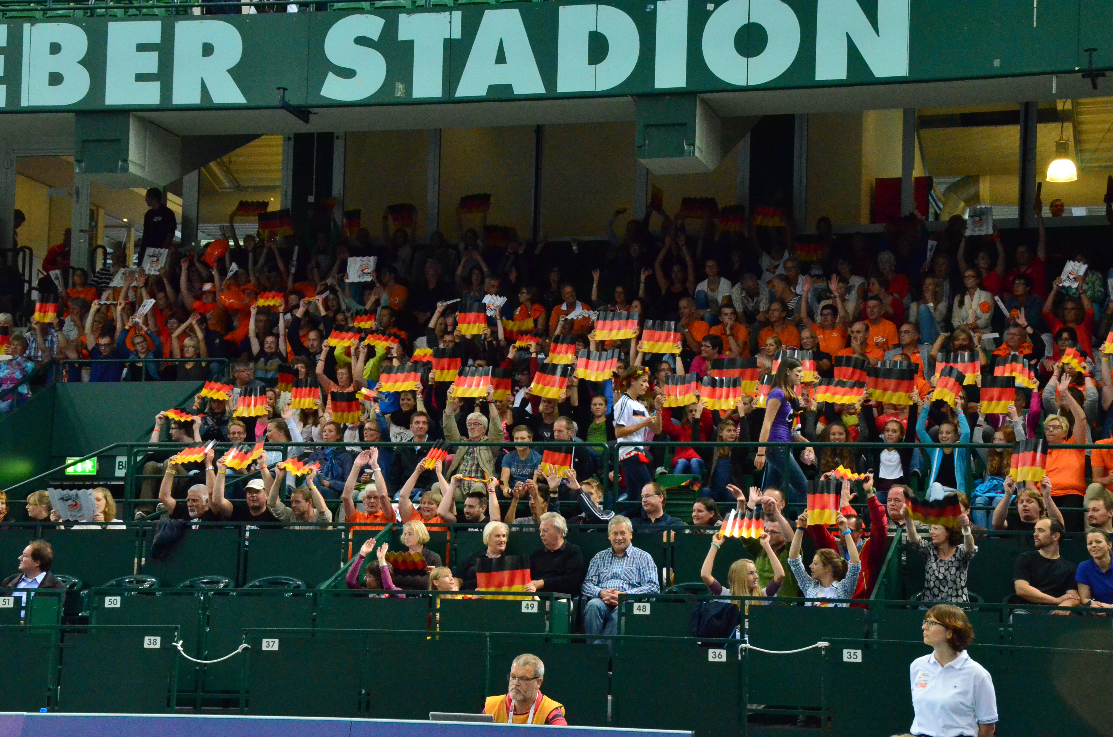 Volleyball-Europameisterschaft der Frauen 2013-Spielort Halle (Westf) Gerry-Weber-Stadion - Spiel 8. September 2013 (Spanien-Niederlande)